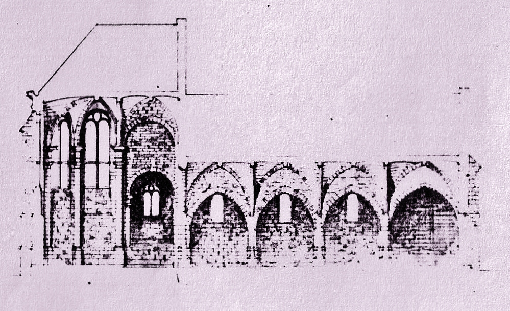 Coupe de l'église de Maffliers avant la reconstruction de la nef au XIXe siècle.